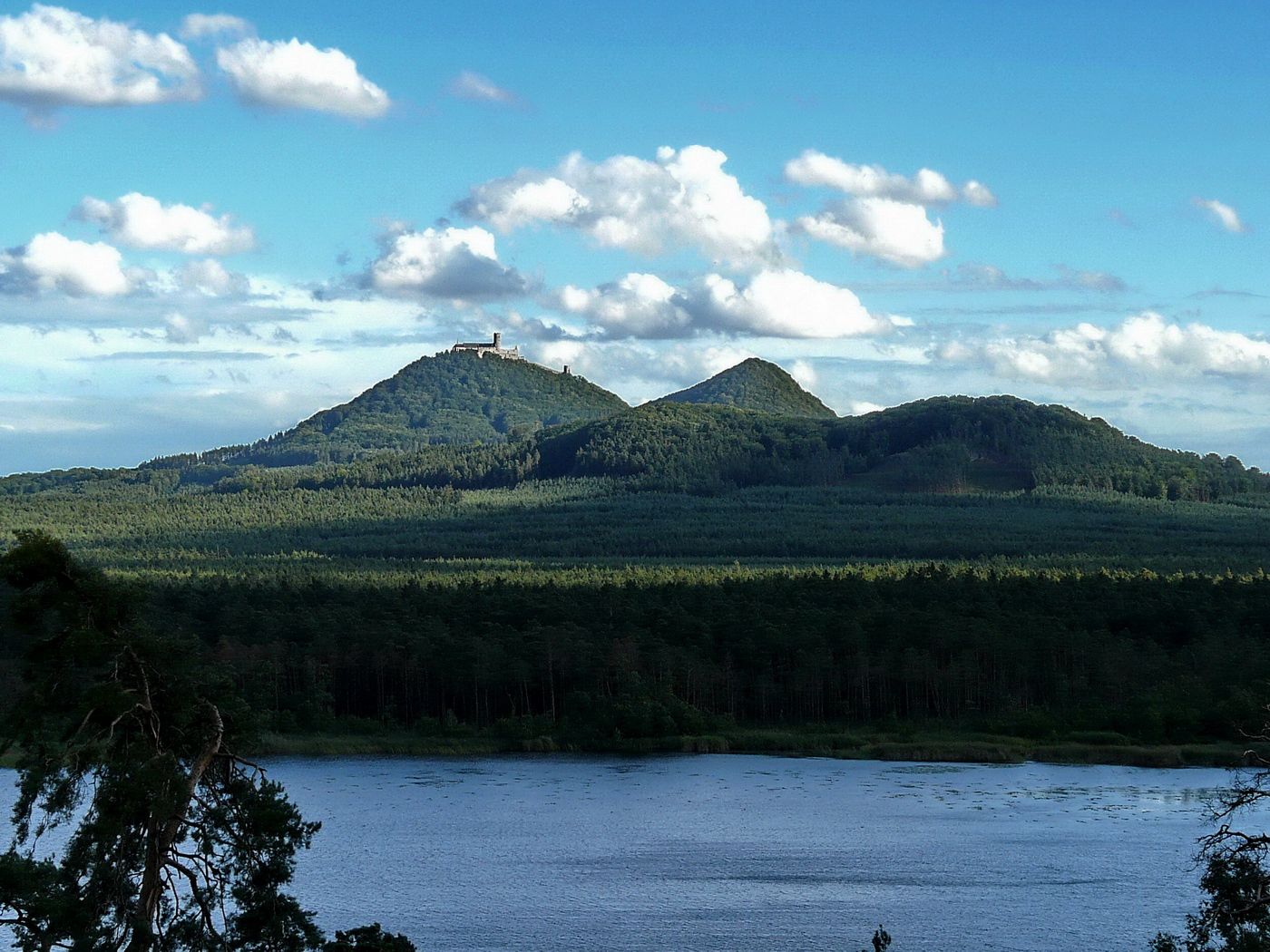 Bezdězy a Slatinné vrchy nad Břehyňským rybníkem z Mlýnského vrchu